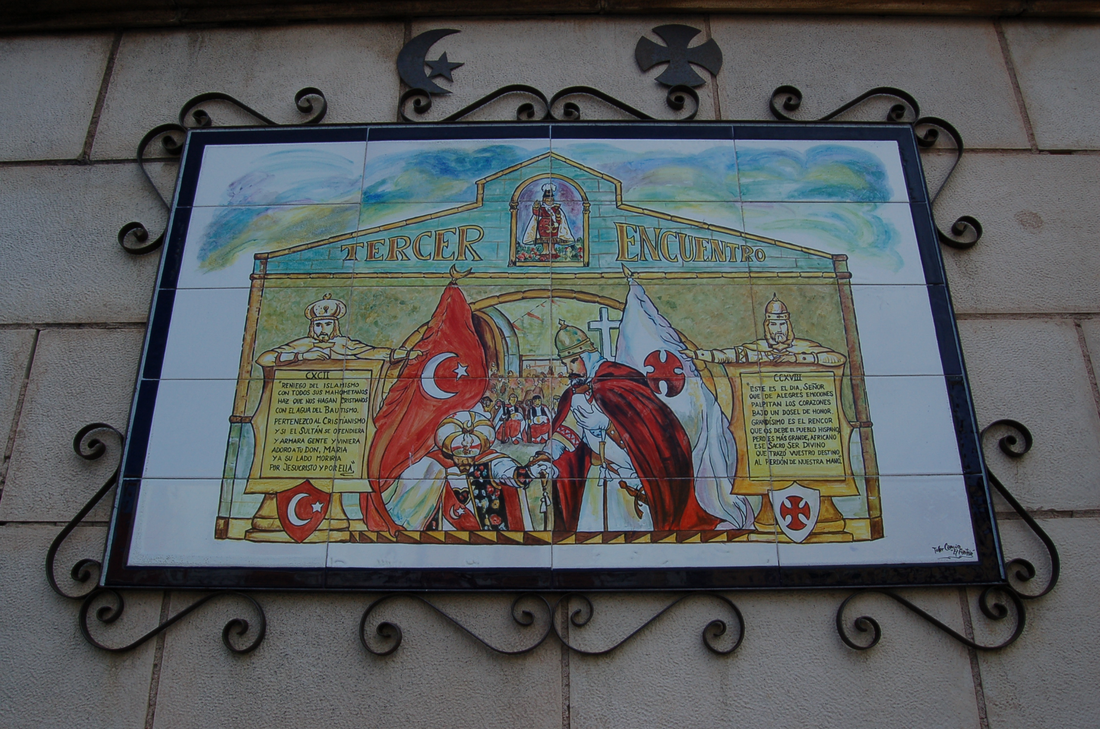 Placa Tercer encuentro Moros y Cristianos Valverde de Júcar